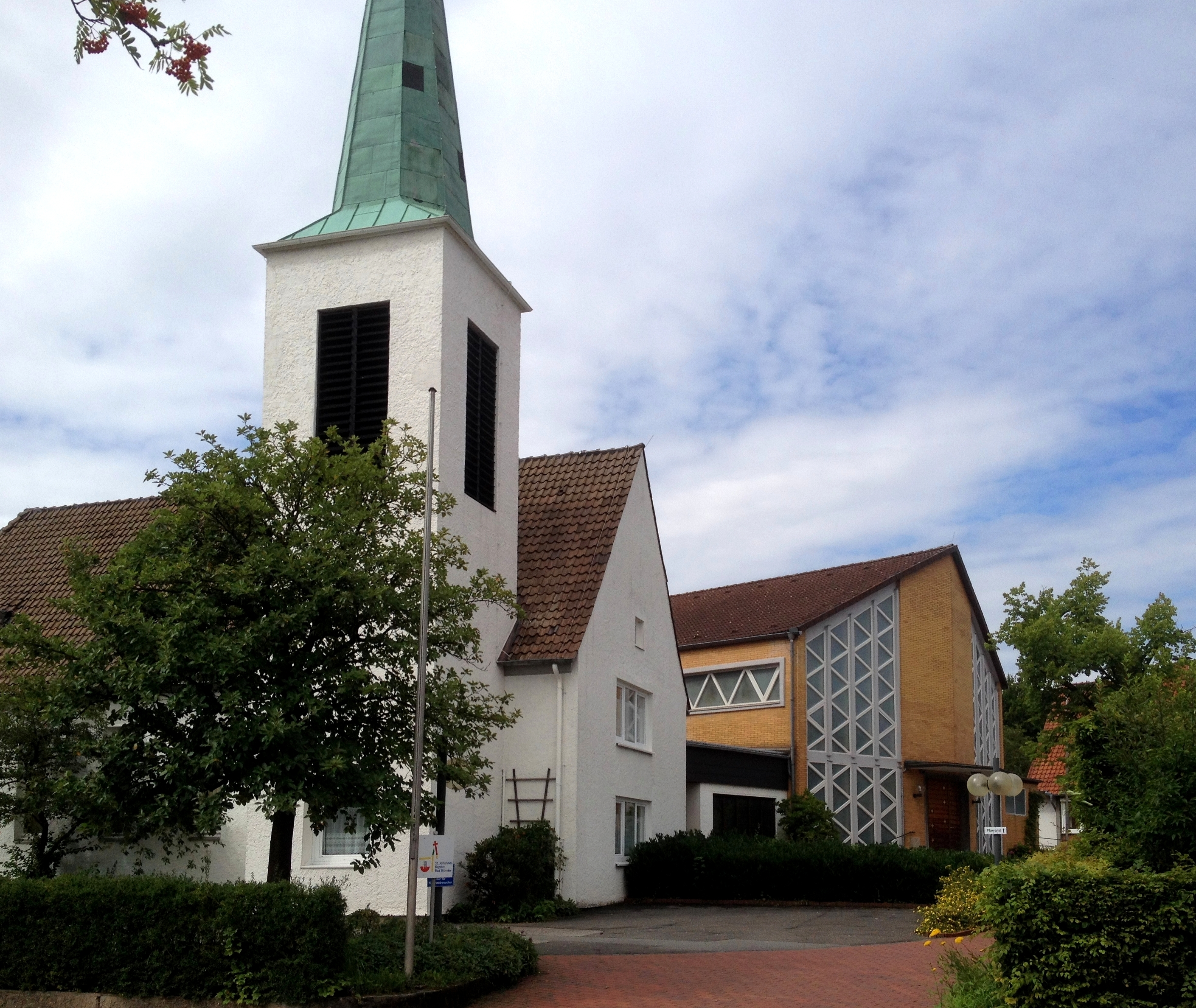 Bad Münder, kath. Kirche St. Johannes Baptist